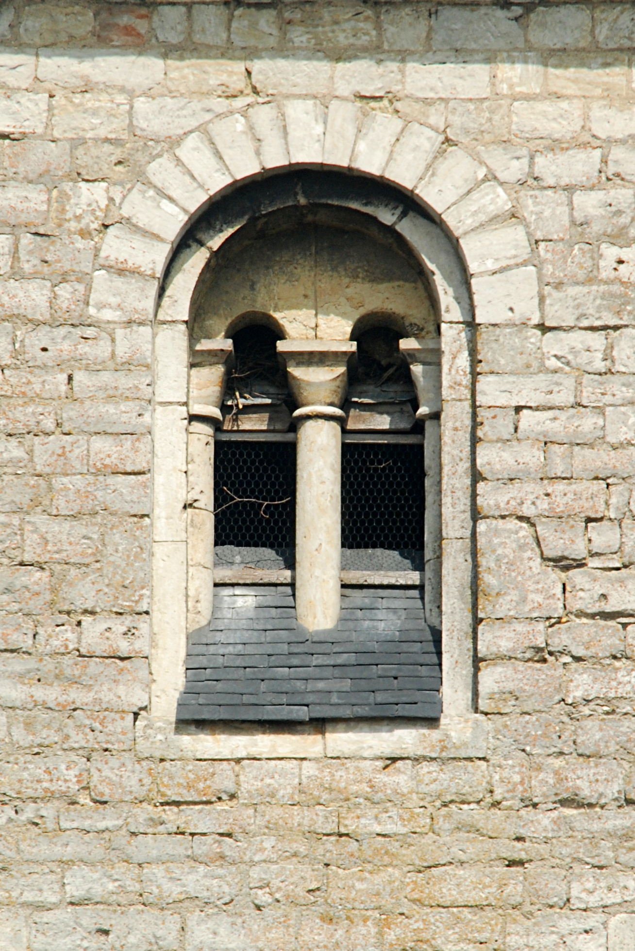 Belgique - Brabant wallon - Jodoigne - Église Saint-Pierre de Sainte-Marie-Geest